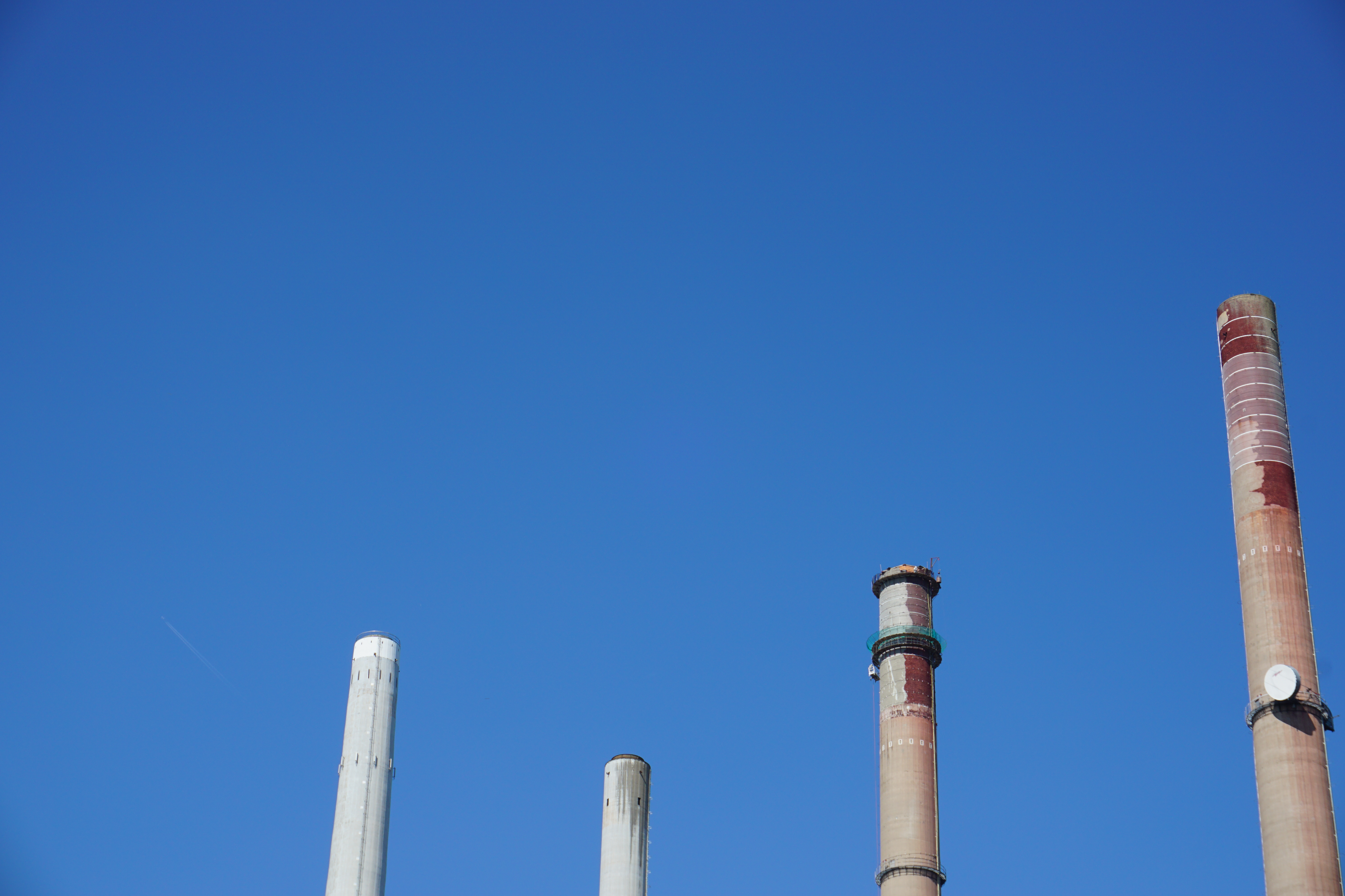 Nach ca. 2 Jahren harter Arbeit auf Arbeitsplattformen in luftiger Höhe wurden die oberen 30 Meter Ziegelsteine der Schornsteine von Block 1 und 2 des Kraftwerks Staudinger abgetragen. Hier die Arbeitsplattform des Schornsteins von Block 2.